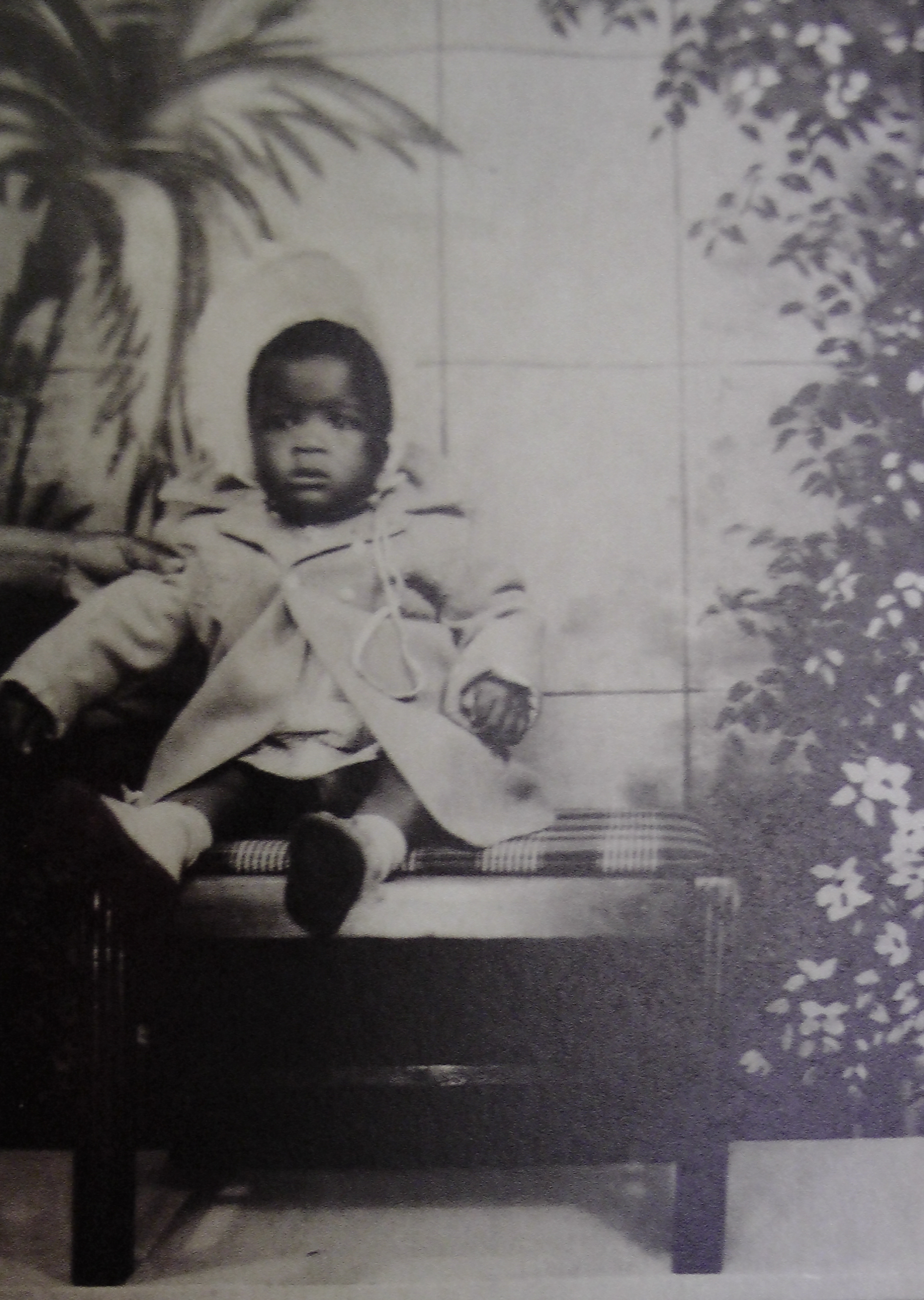 Коллекция Linda Fregni Nagler, № 0283, 11,5 х 8 см